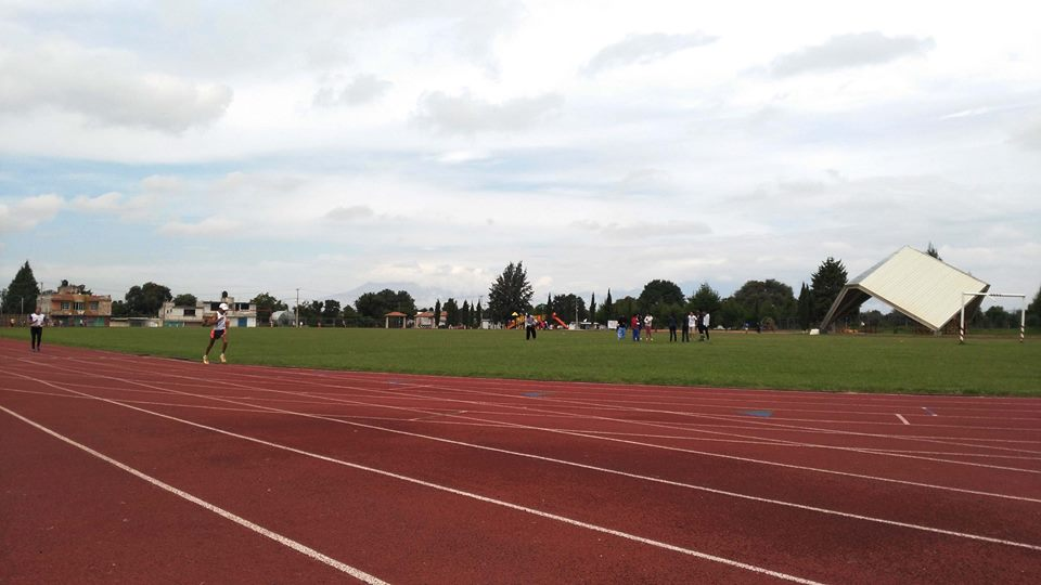 Campos deportivos El Chatlal